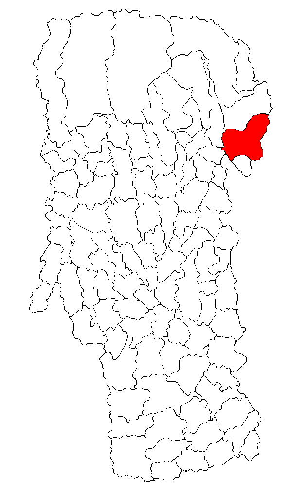 Categorie:Hărţi ale judeţului Argeş